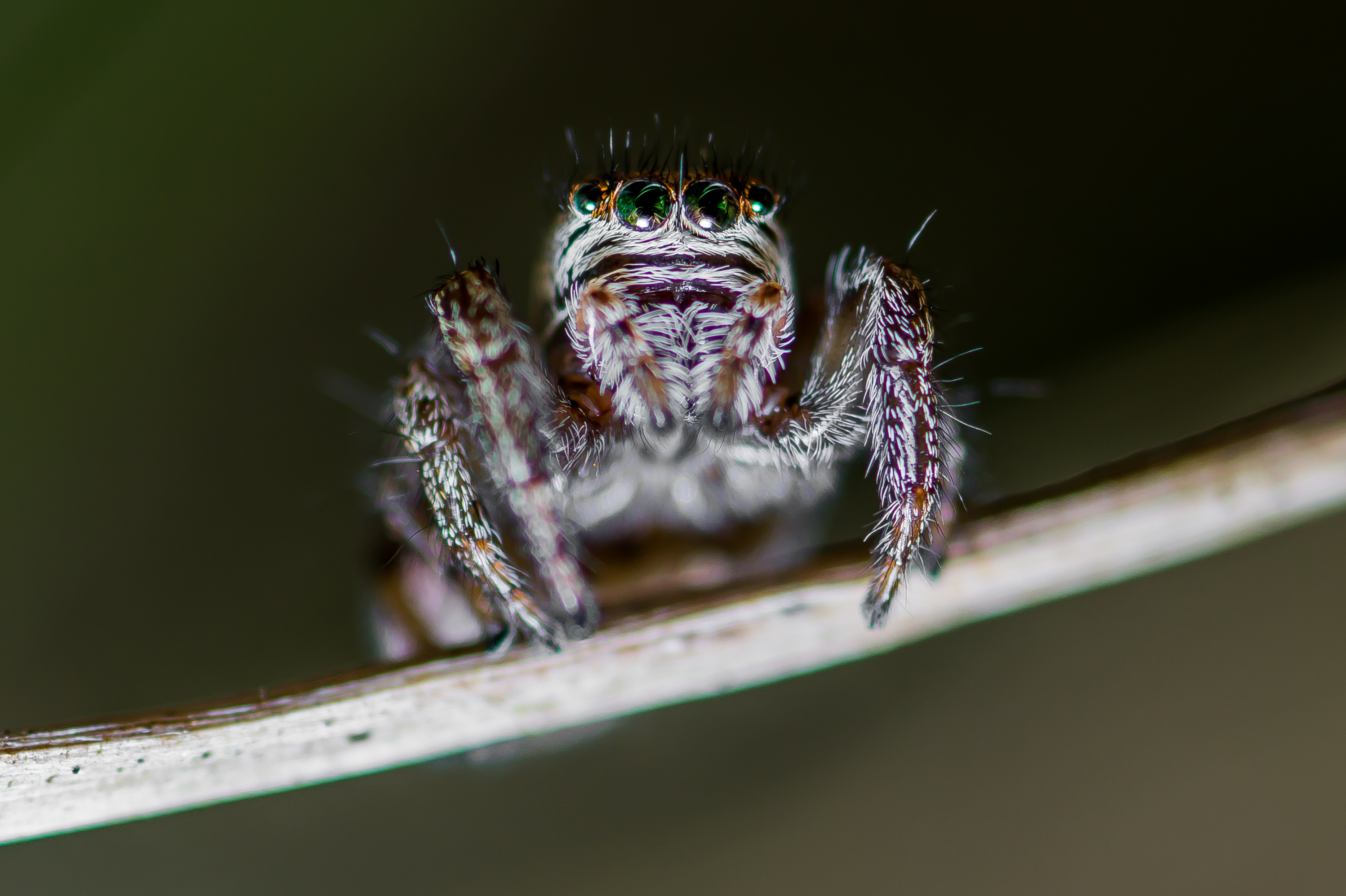 Eine ca. 6mm kleine weibliche Evarcha arcuata aus dem Jahr 2016, aufgenommen in der Wahner Heide (NRW).